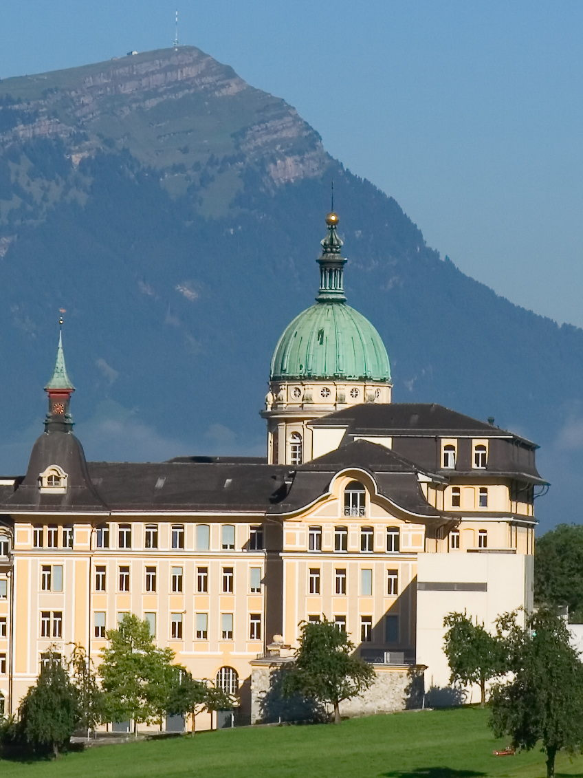 Die Kantonsschule Kollegium in Schwyz